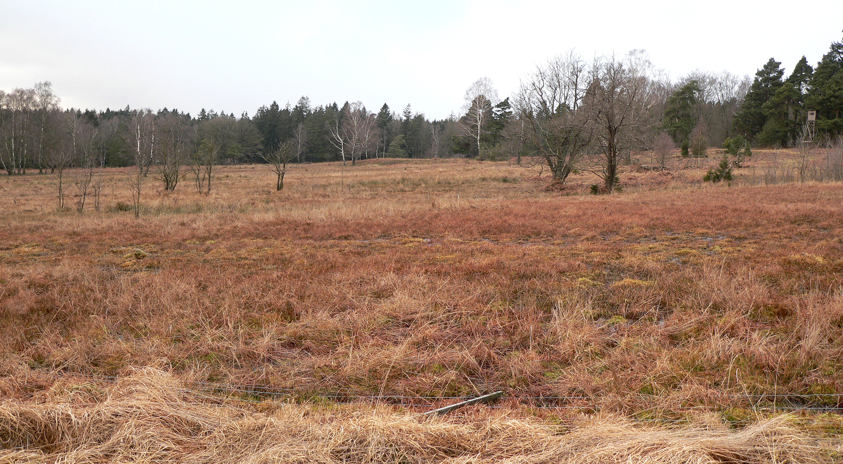 Aussicht vom Bohlenweg auf das Hühnerfeld